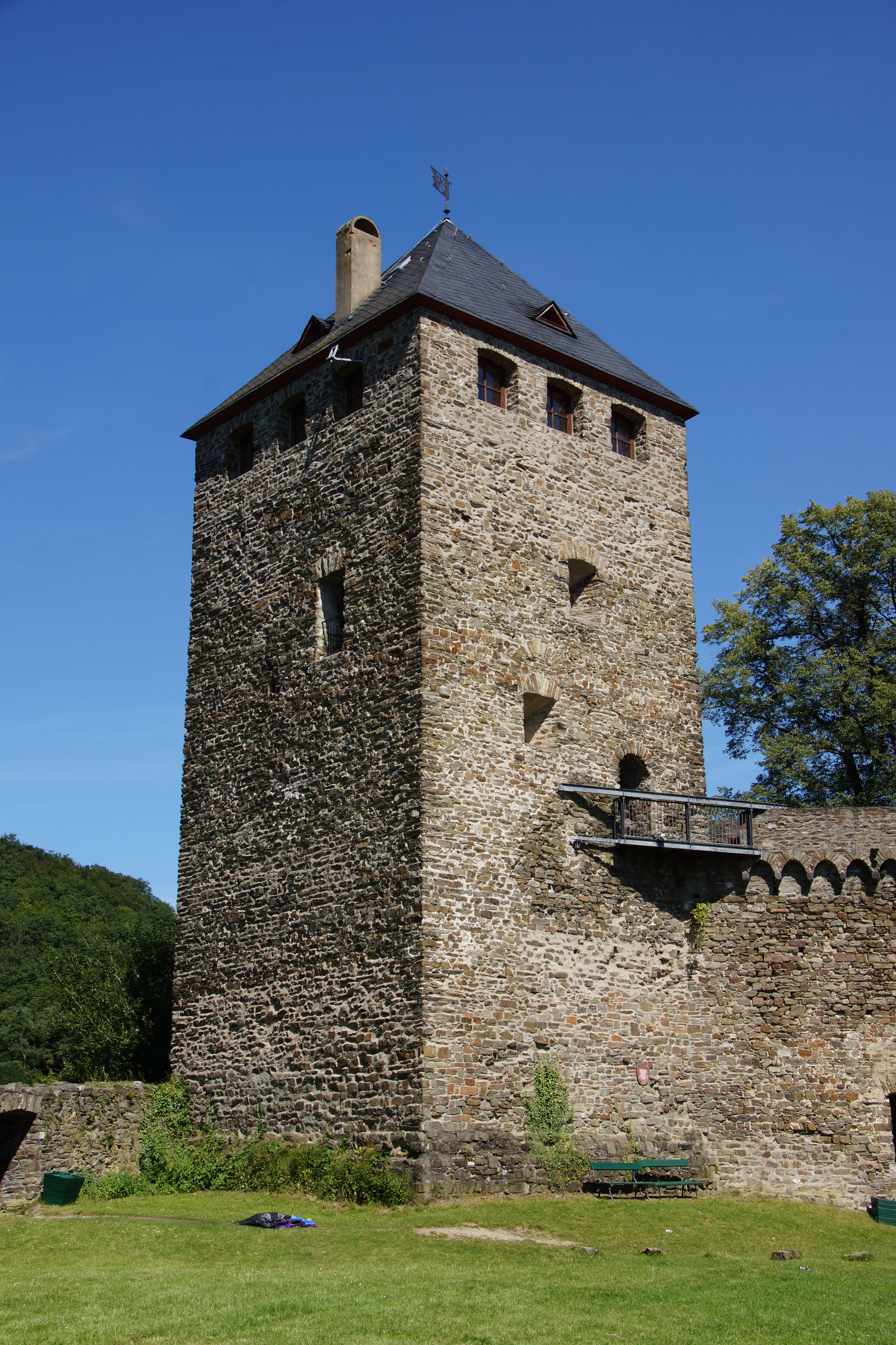 Bergfried Burg Sayn in Bendorf